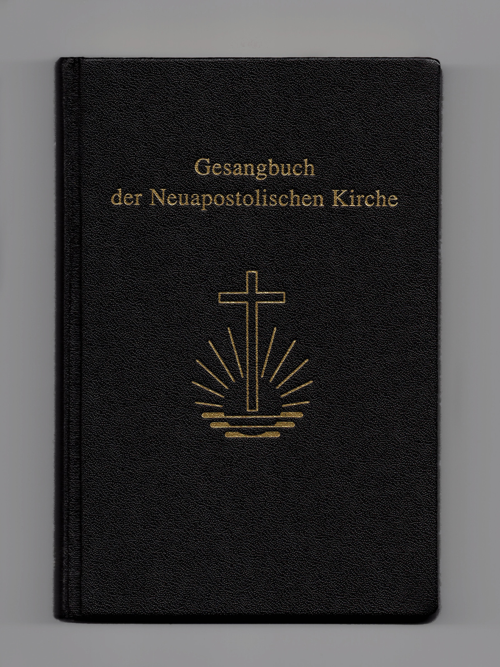 Cover des Gesangbuchs der Neuapostolischen Kirche (einstimmige Notenausgabe)